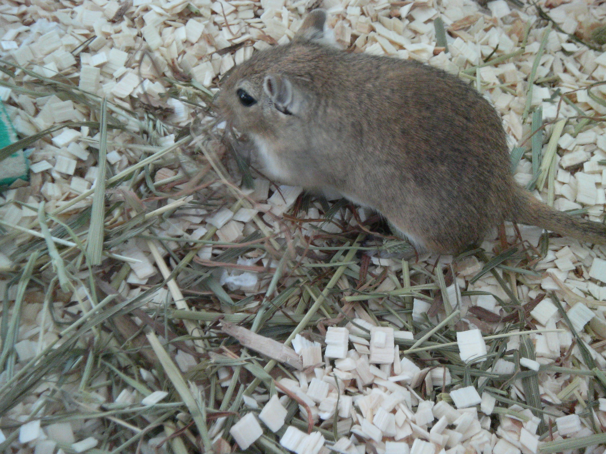 A pet gerbil gnawing hay.